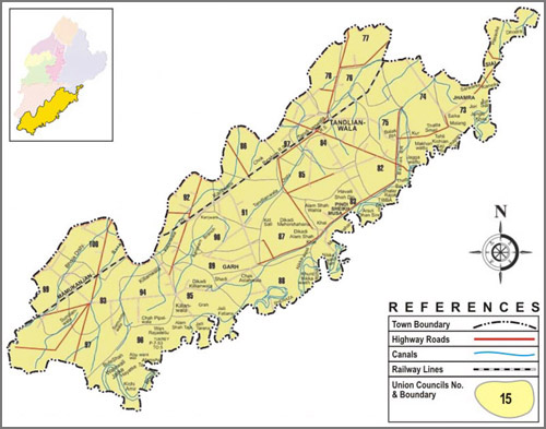 پنجابی: تحصیل تاندیانوالہ دیاں یونین کونسلاں